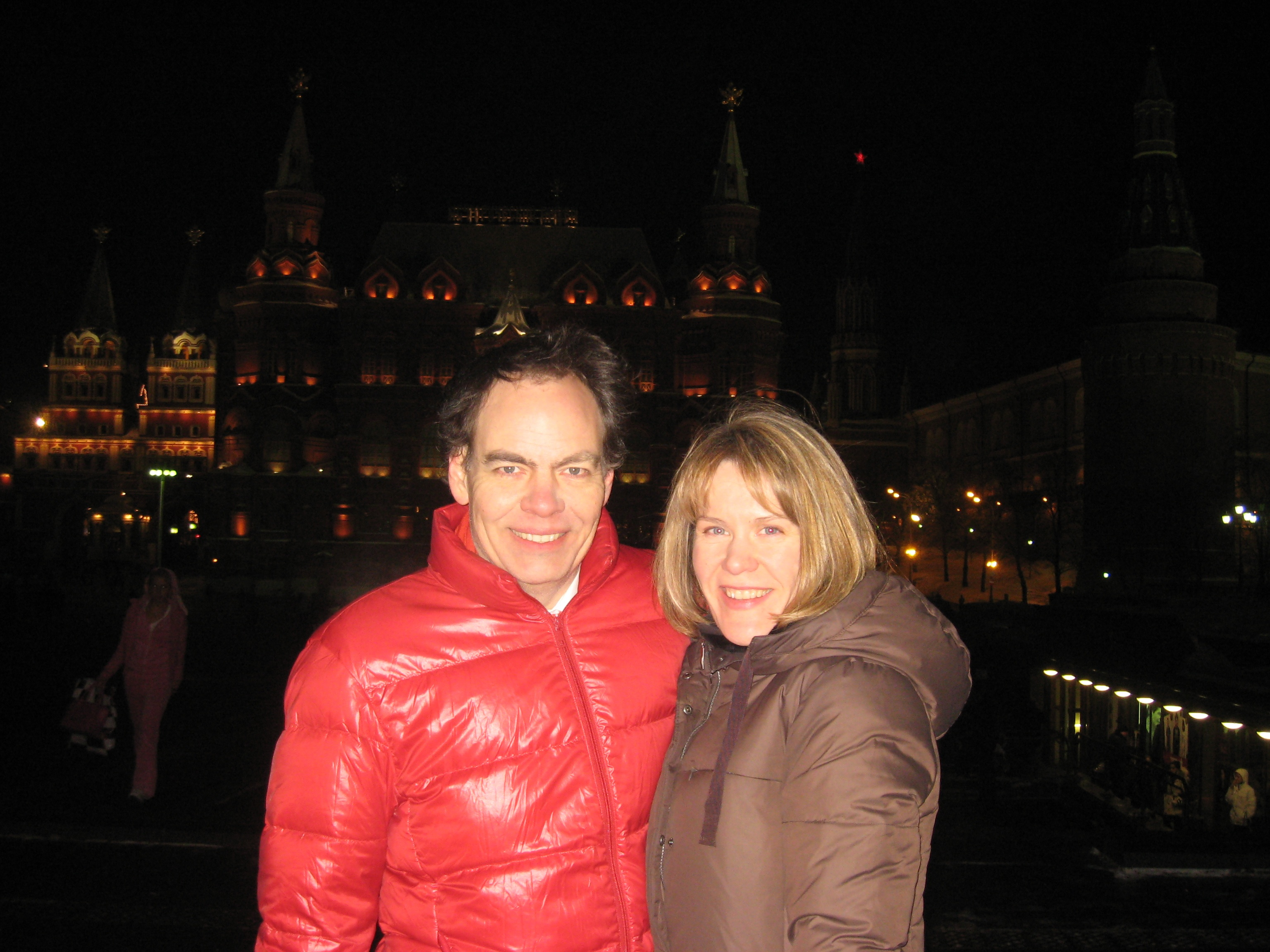 Max Keiser and Stacy Herbert at Kremlin